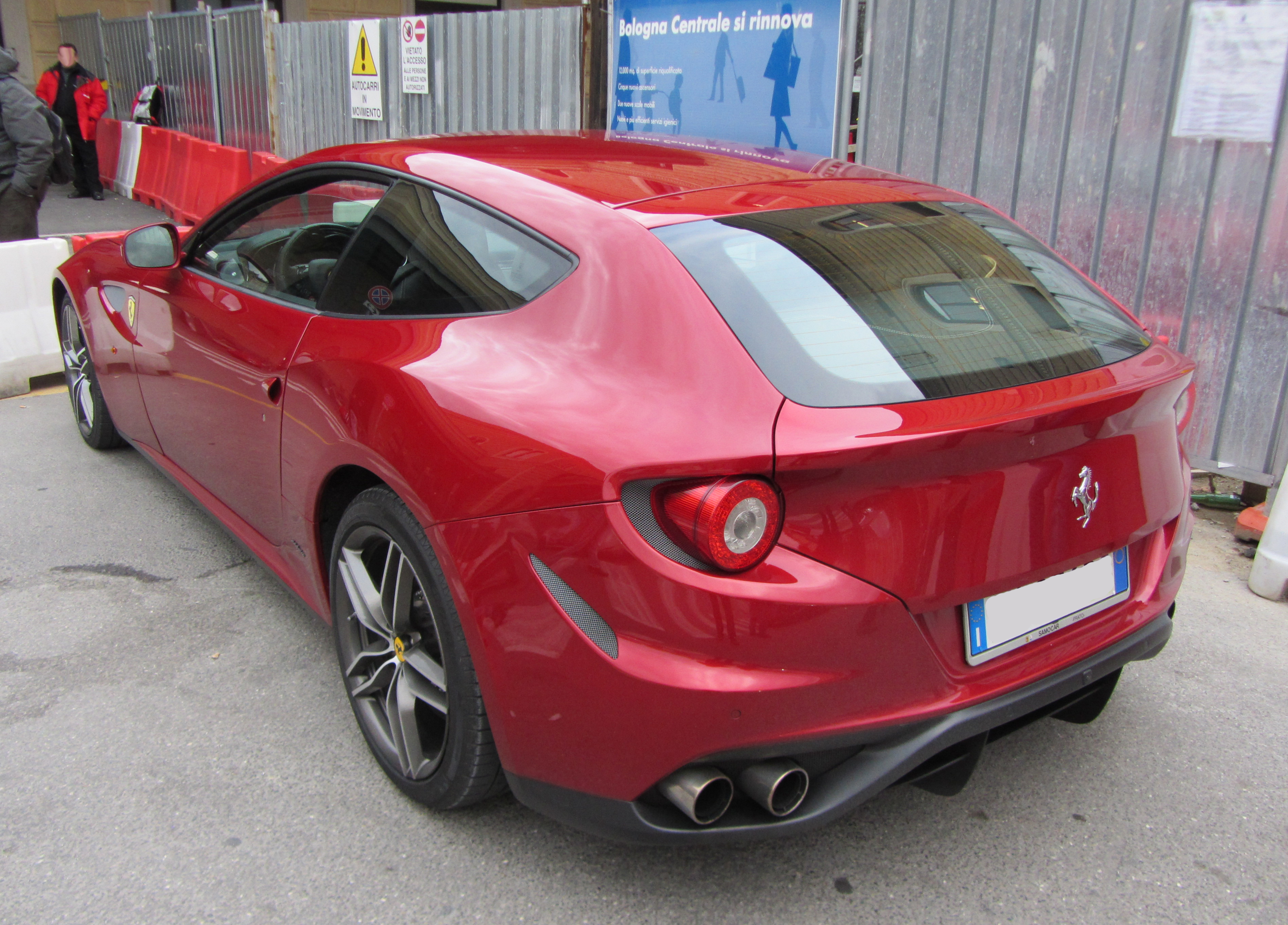 trequarti posteriore di una FF rossa a Bologna